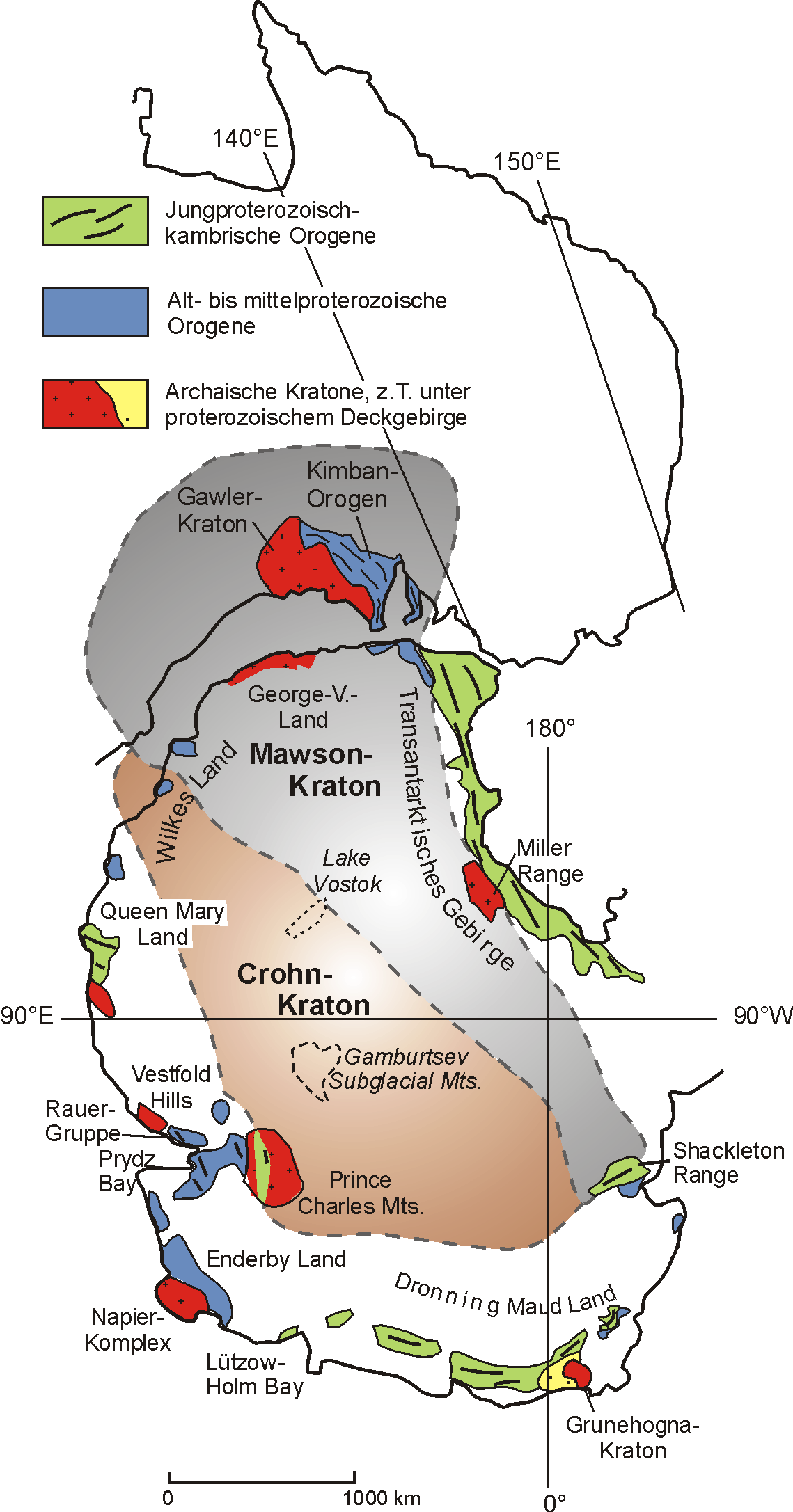 Rekonstruktion des mittelproterozoische Mawson-Kratons mit seinen Bruchstücken in Südaustralien und Antarktika, maximale angenommene Ausdehnung.